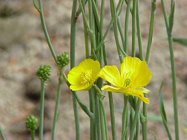 Species: Ranunculus gramineus Family: Ranunculaceae Image No. 1